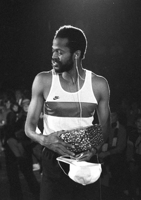 Gastgeschenke für den Hallenweltmeister im Dreisprung Willie Banks (1.v.l.).